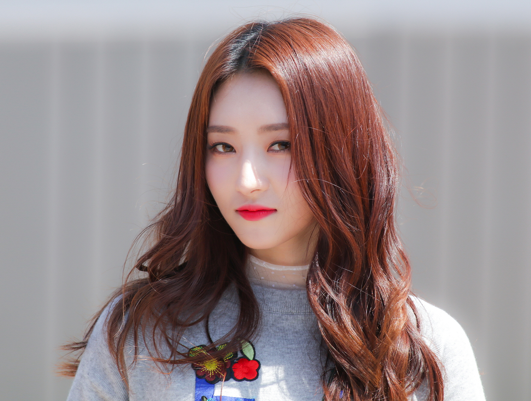 170908 드림캐쳐 뮤직뱅크 미니팬미팅 by SinC